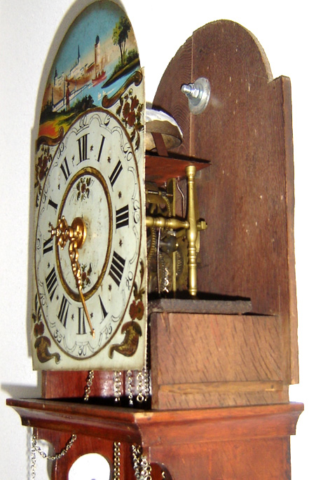 Friese staartklok, gedateerd 1861.